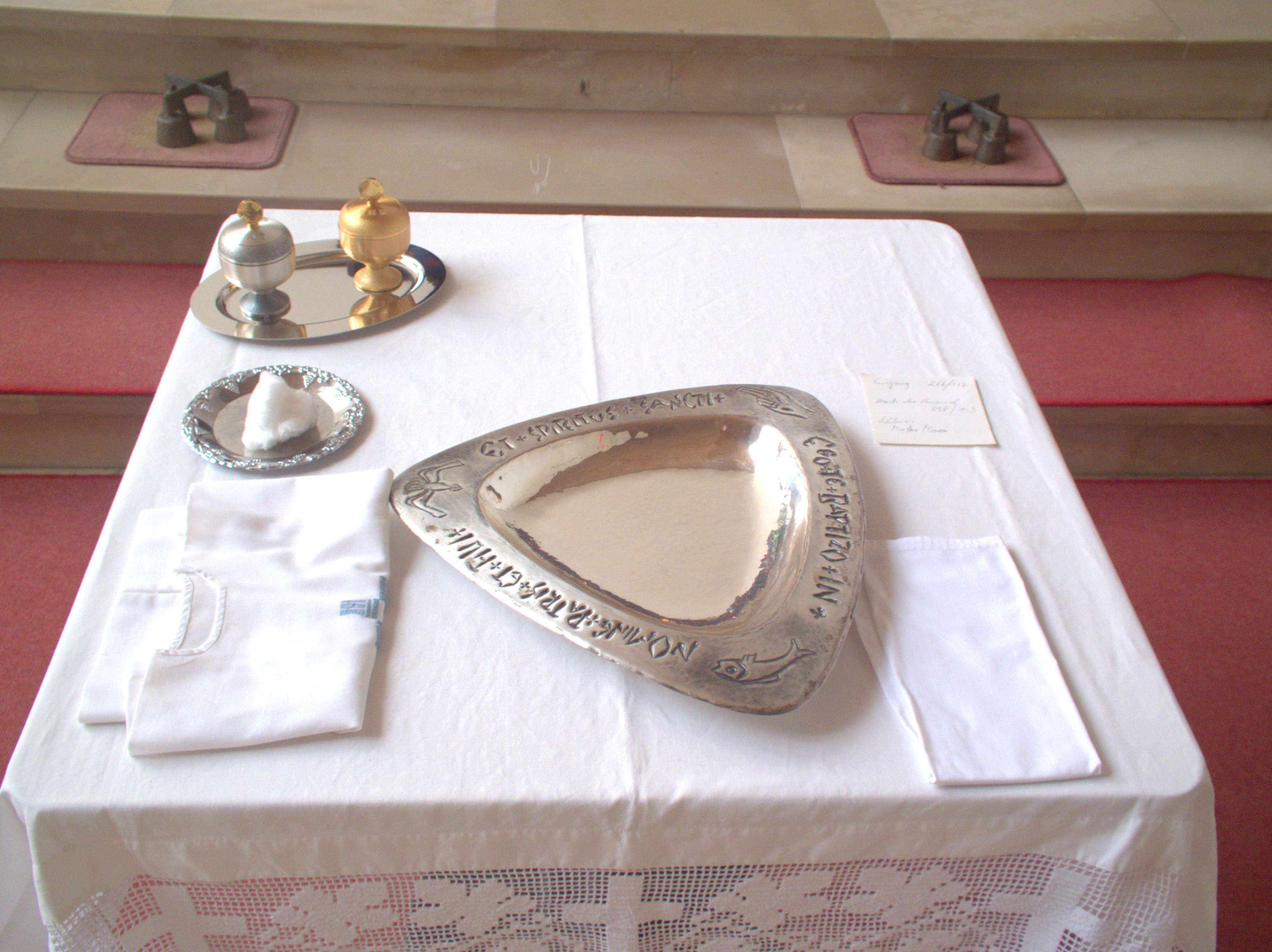 Die katholische Filialkirche St. Pius im Neumarkter Stadtteil Hasenheide: Taufgerätschaften, Behälter für Chrisam und Katechumenöl, Schale für das Weihwasser, Taufhemd